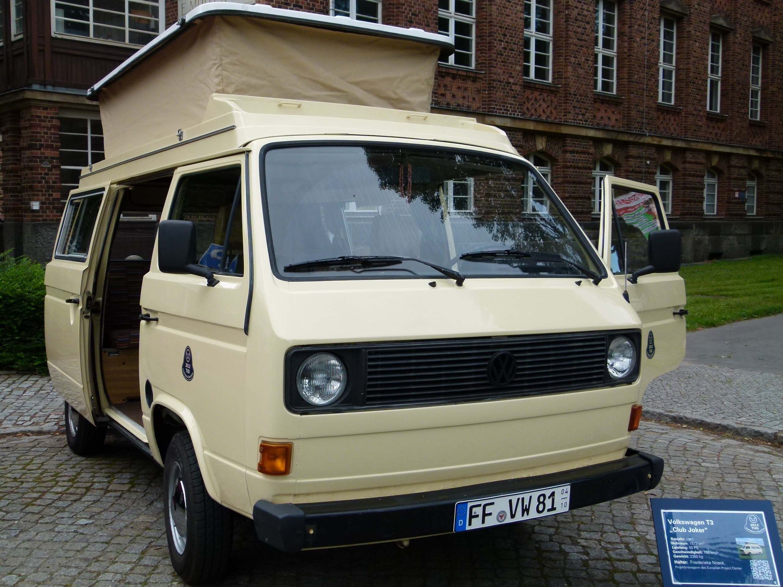 Volkswagen T3, Club Joker, 1981, (1. TUD Campus Classics, 9.6.2012, Dresden)